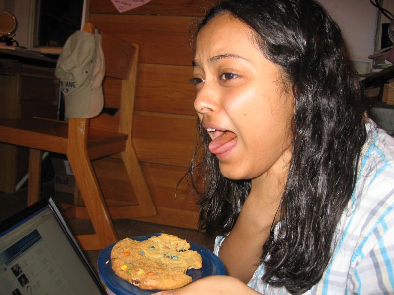 Mulher expressando nojo. Expressão do nojo. Artigo Nojo.